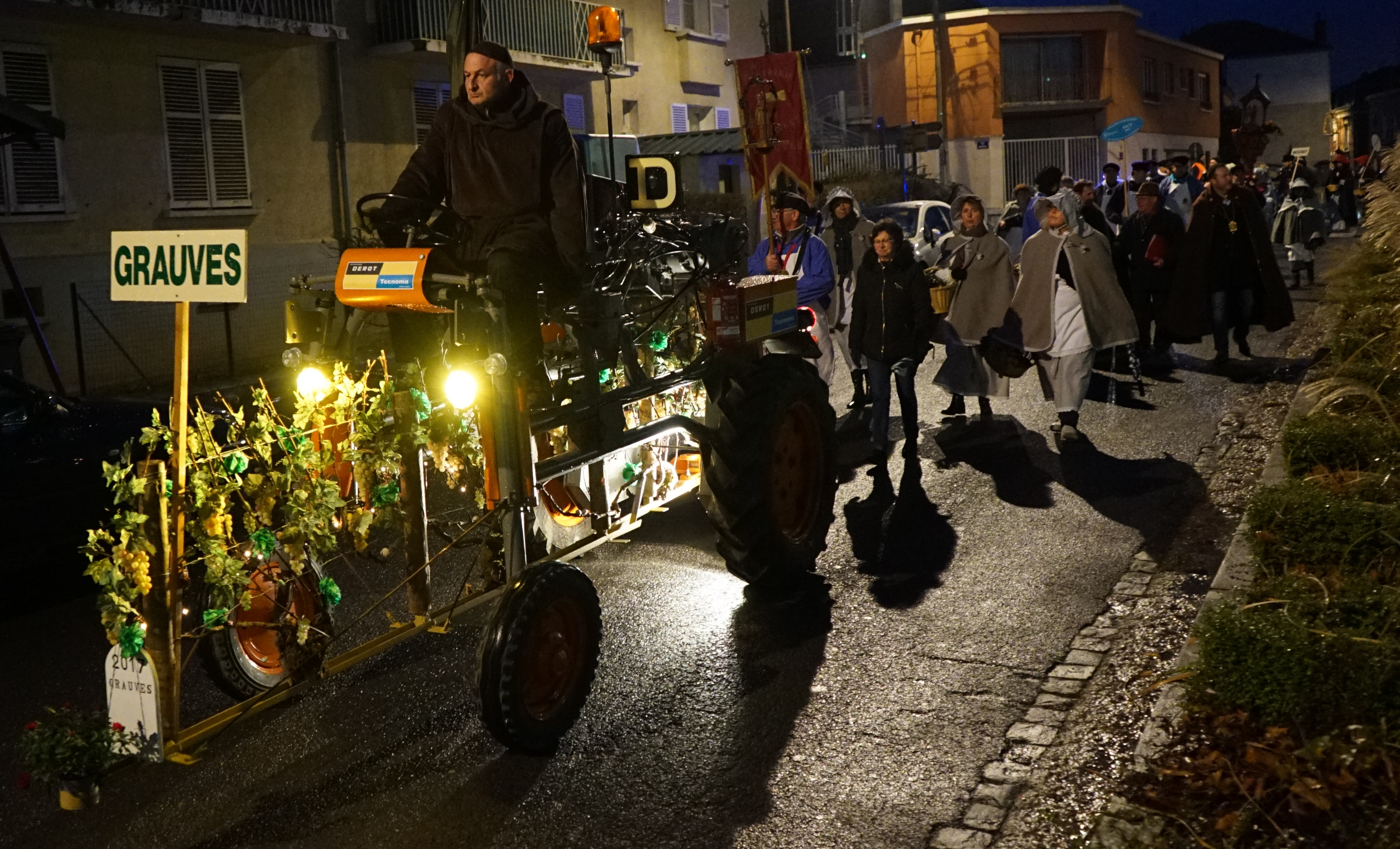 défilé de la st-Vincent à épernay.